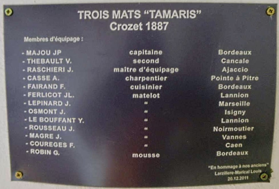 Plaque commémorative en souvenir des victimes des disparus du Tamaris (1887), présente dans la chapelle de la base Alfred Faure, aux îles Crozet.